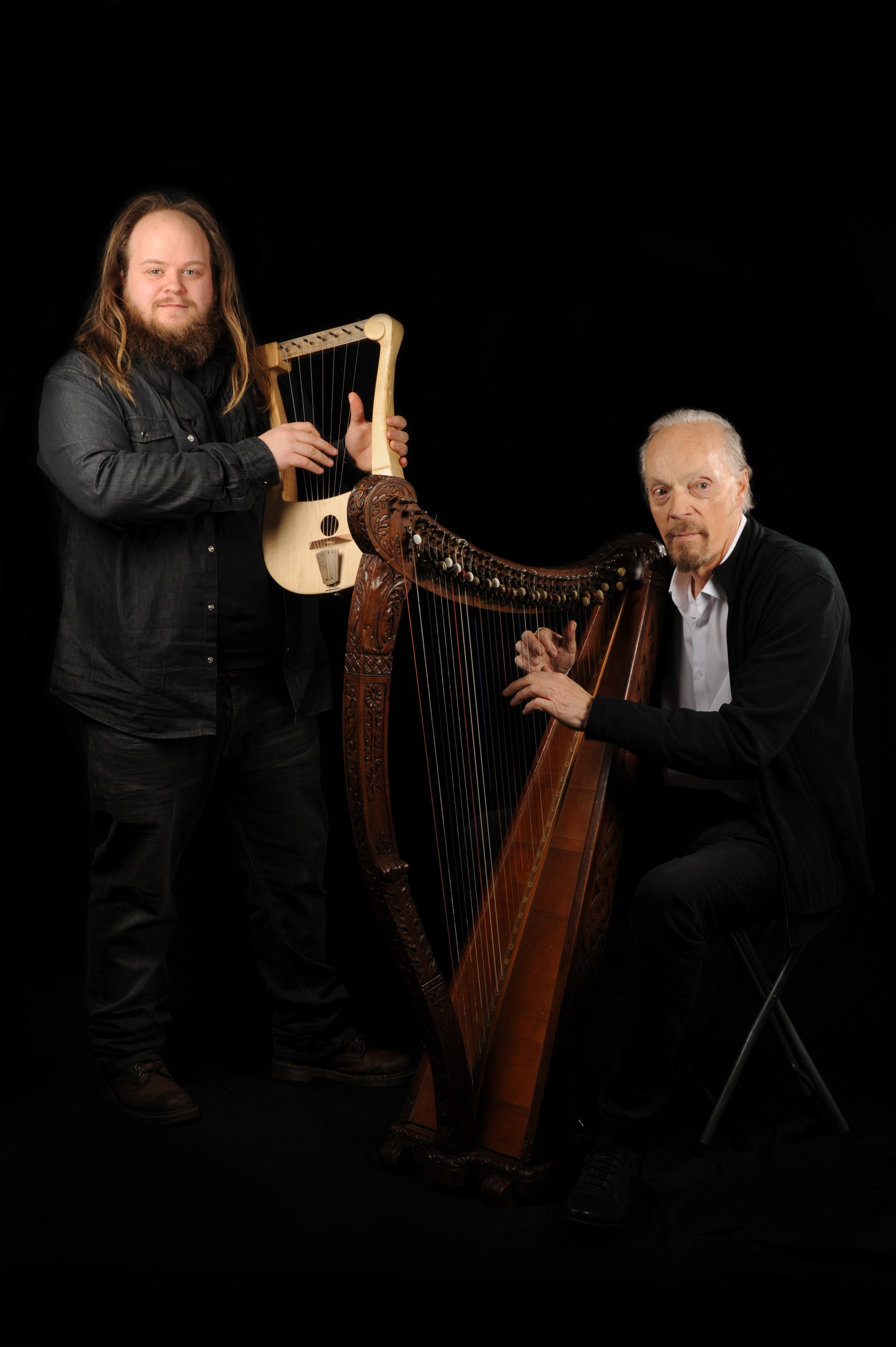 Portrait de la photographe Laureen Keravec consacré à Ar Bard et Alan Stivell à l’occasion de l'invitation de Ar Bard sur l'album d'Alan Stivell. On y retrouve aussi la rencontre inédite de la Harpe Celtique et de la Lyre Celtique, les deux instruments emblématiques des bardes.